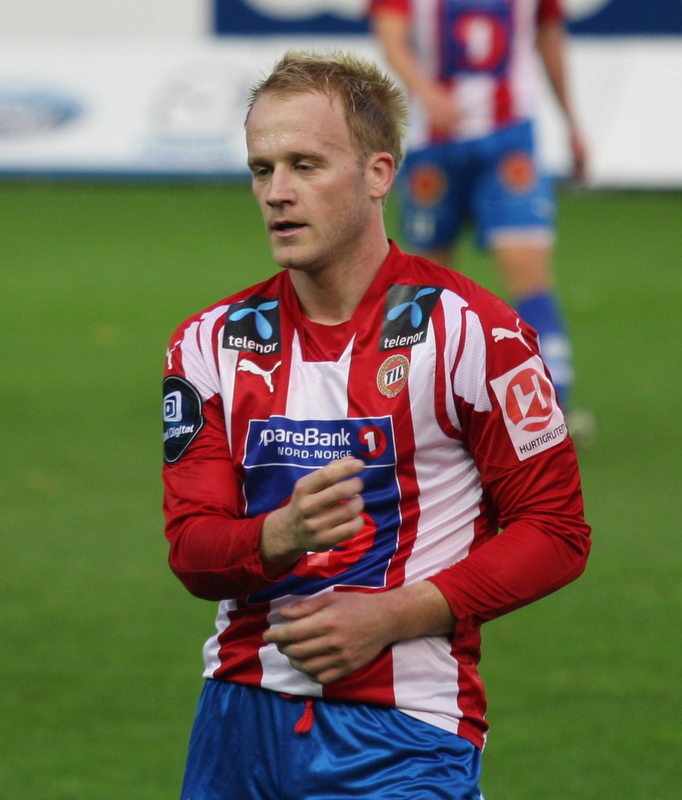 Tommy Knarvik, player for Tromsø IL